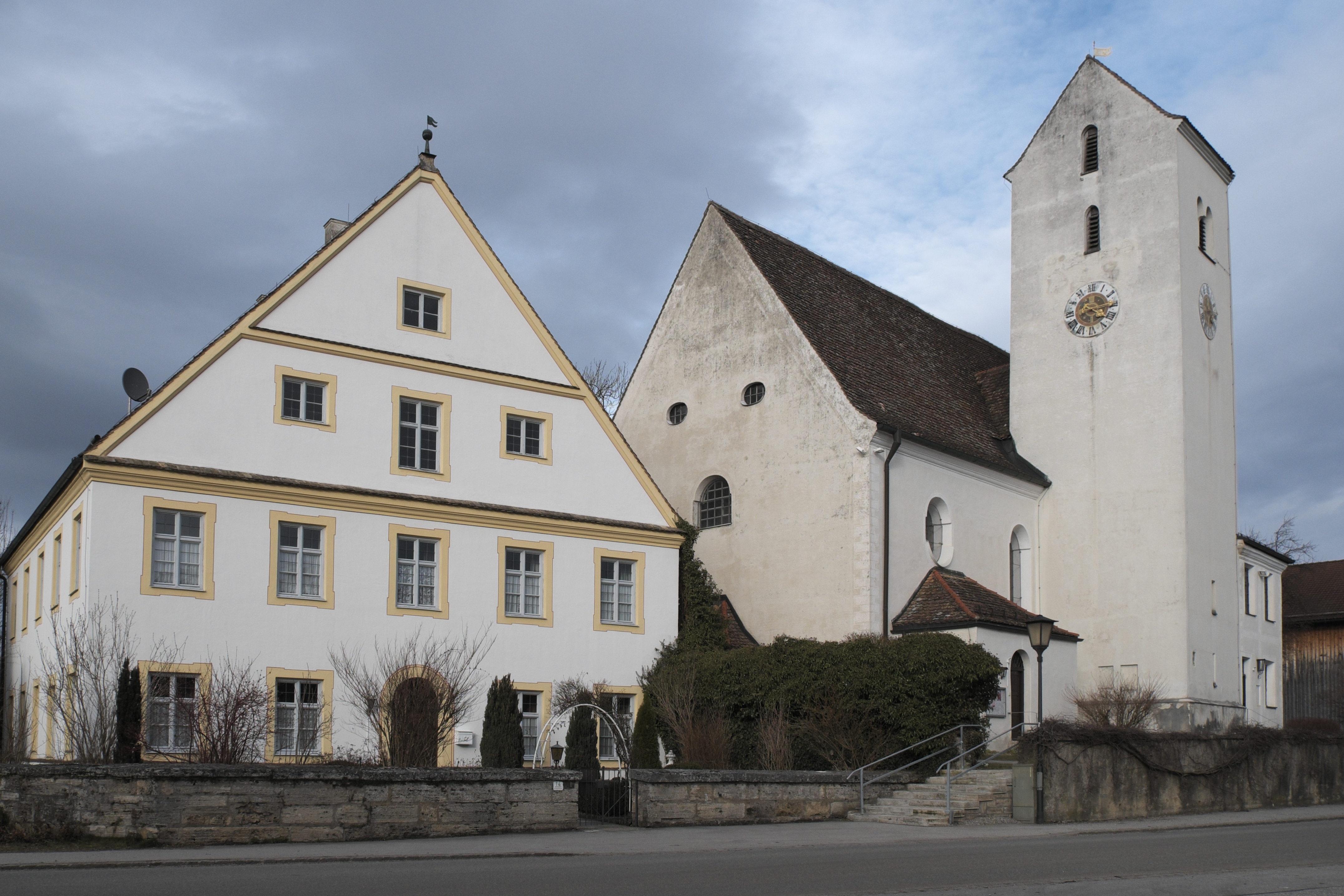 Pfarrhaus in Untereberfing (Eberfing) im Landkreis Weilheim-Schongau (Bayern/Deutschland)